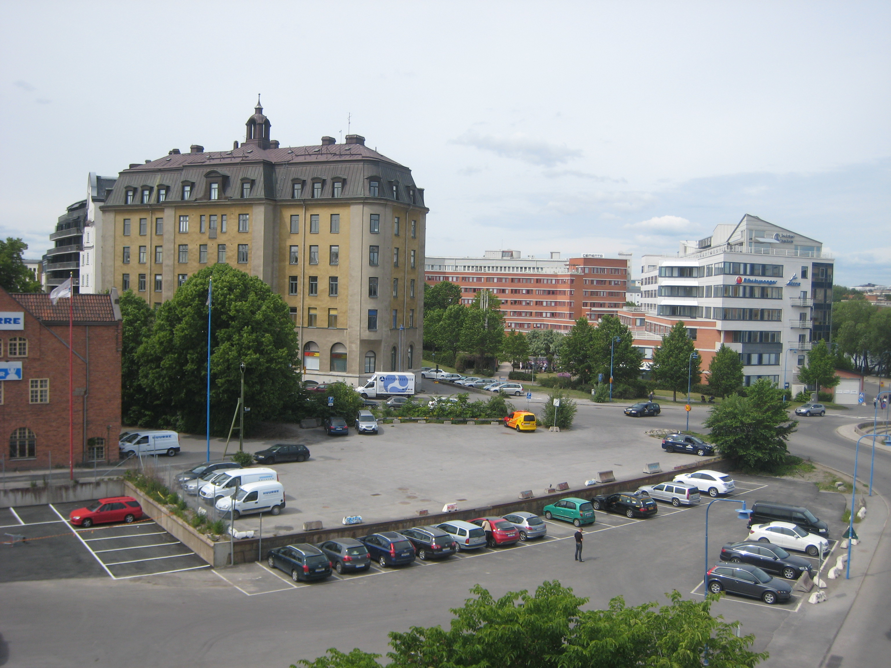 Stora Katrineberg from Liljeholmsbron.